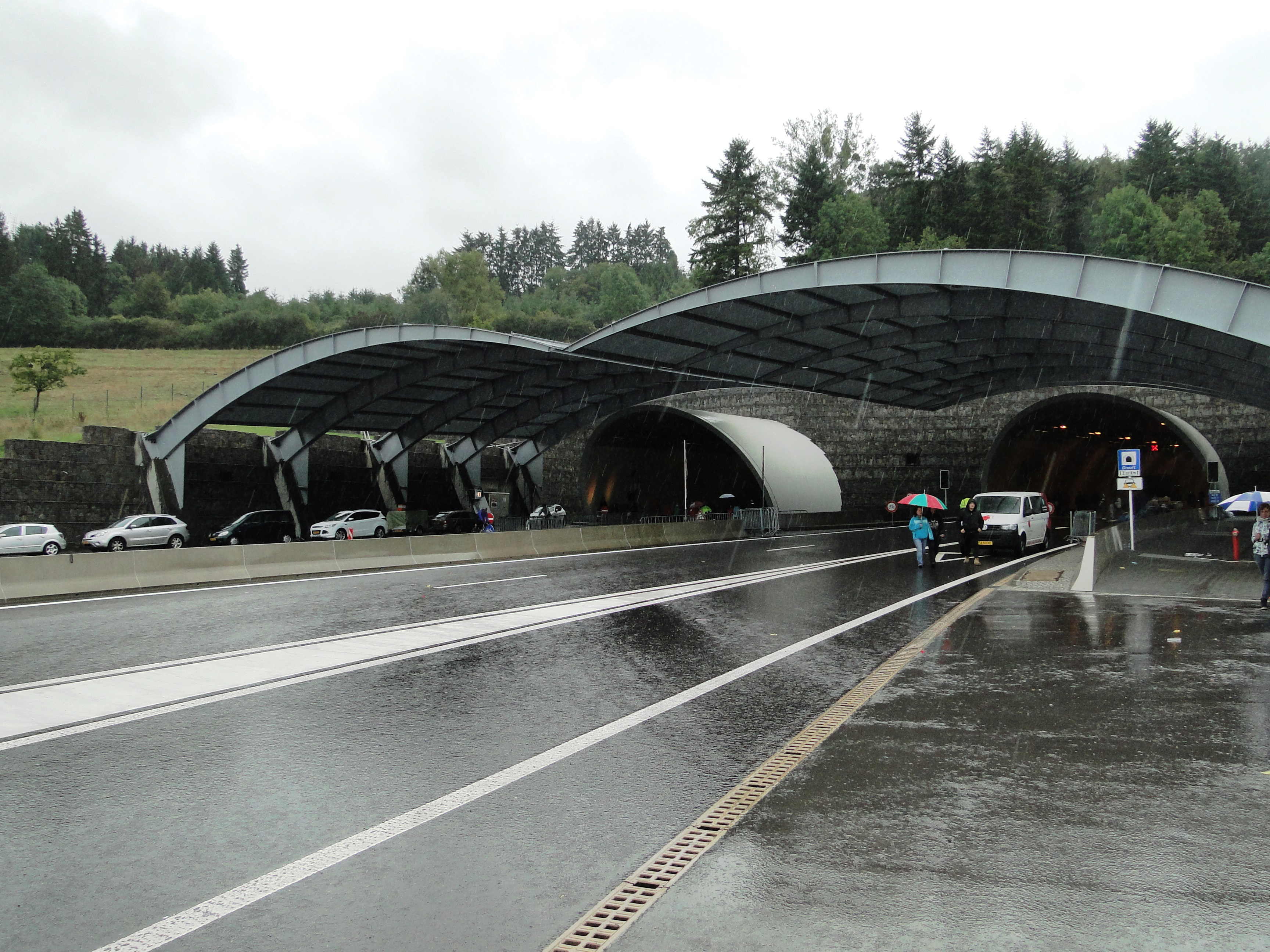 Porte Ouverte am Tunnel "Grouft" - Nordagank